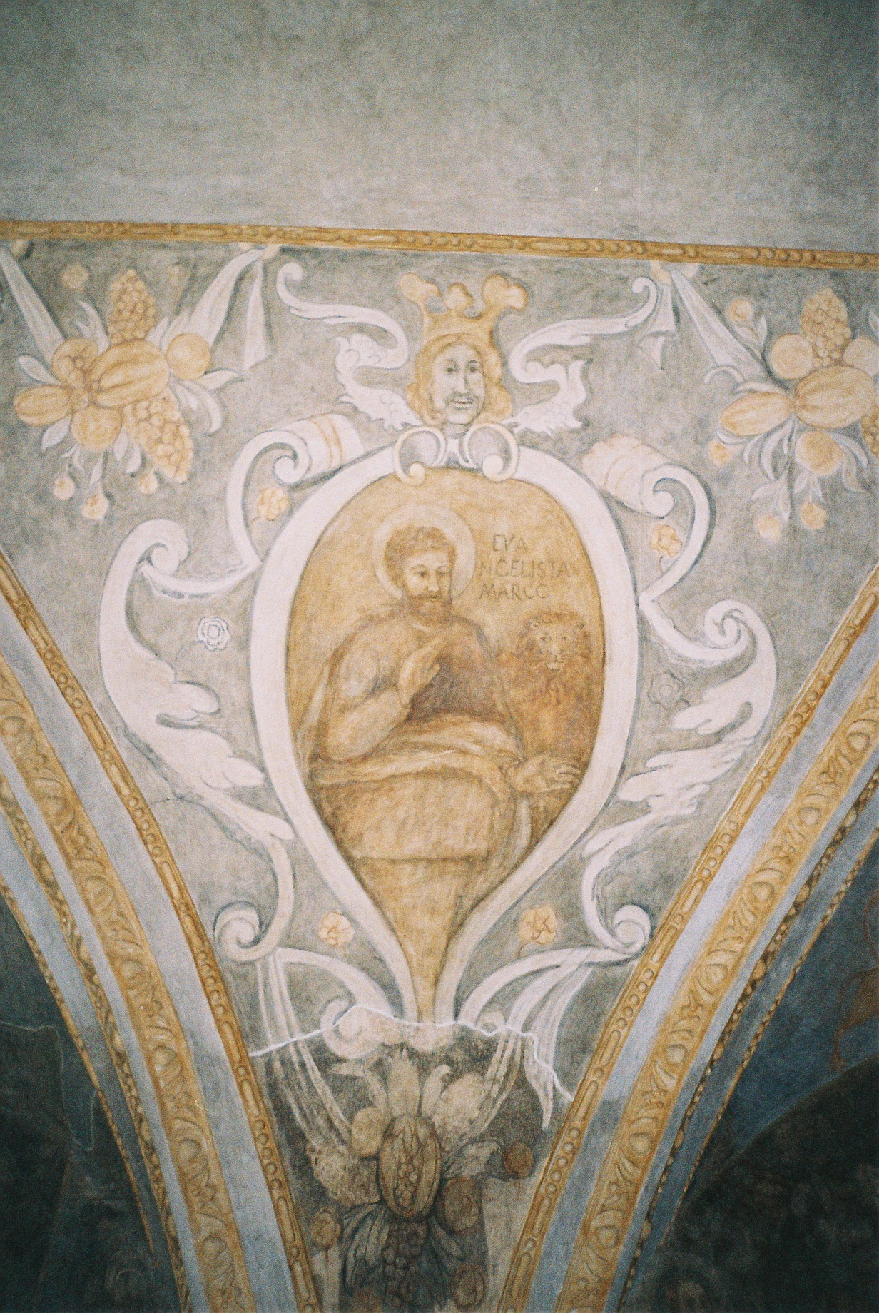 kamienica Gruszewiczów - wnętrze 8